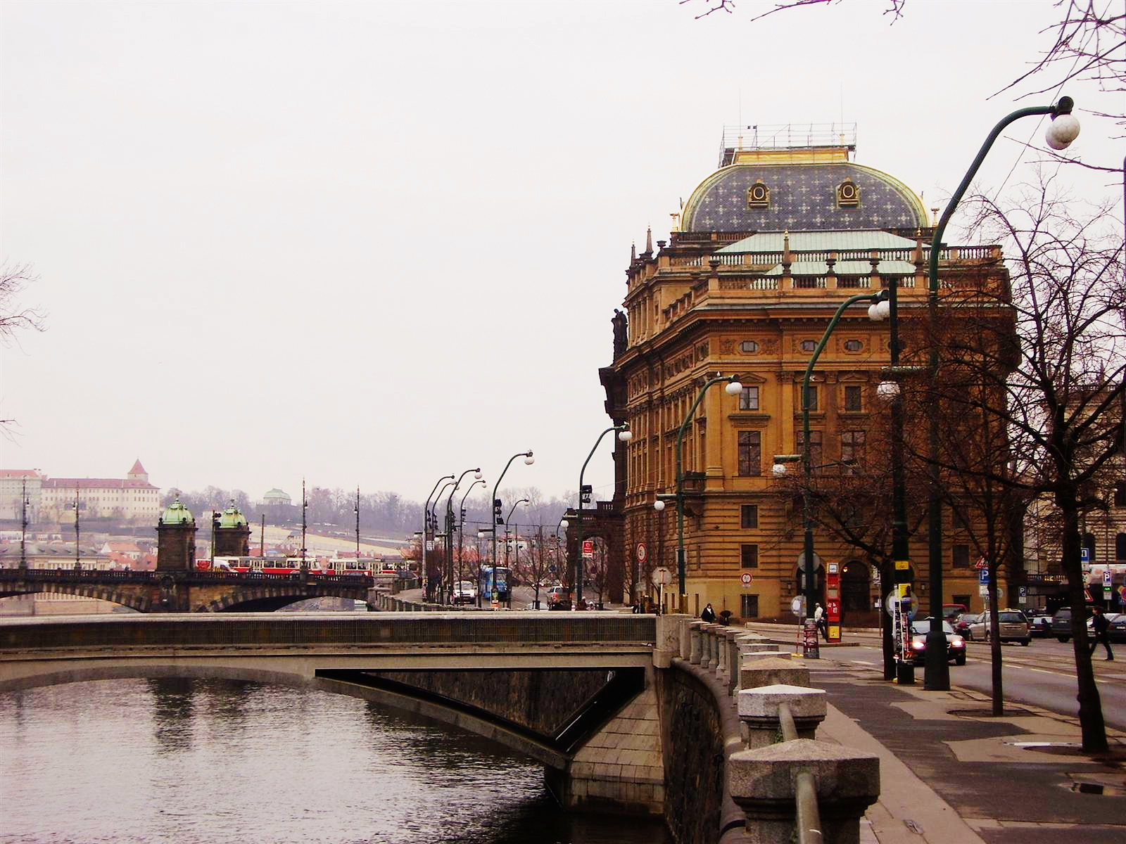 Masarykovo nábřeží v Praze a zadní část budovy Národního Divadla